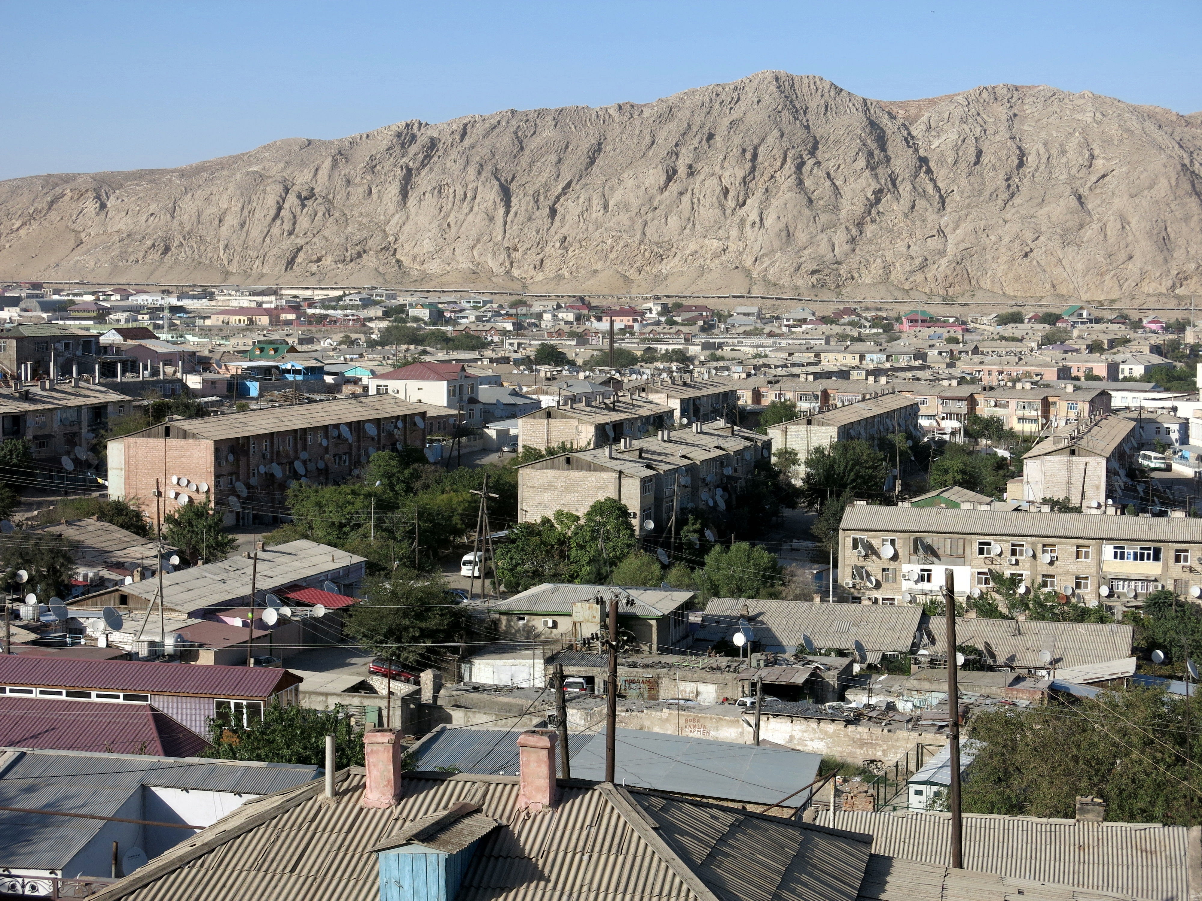 Blick über das rückwärtig gelegene Wohnviertel in Türkmenbaschy auf das Küstengebirge